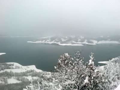 Lago de Nikolaos Plastiras